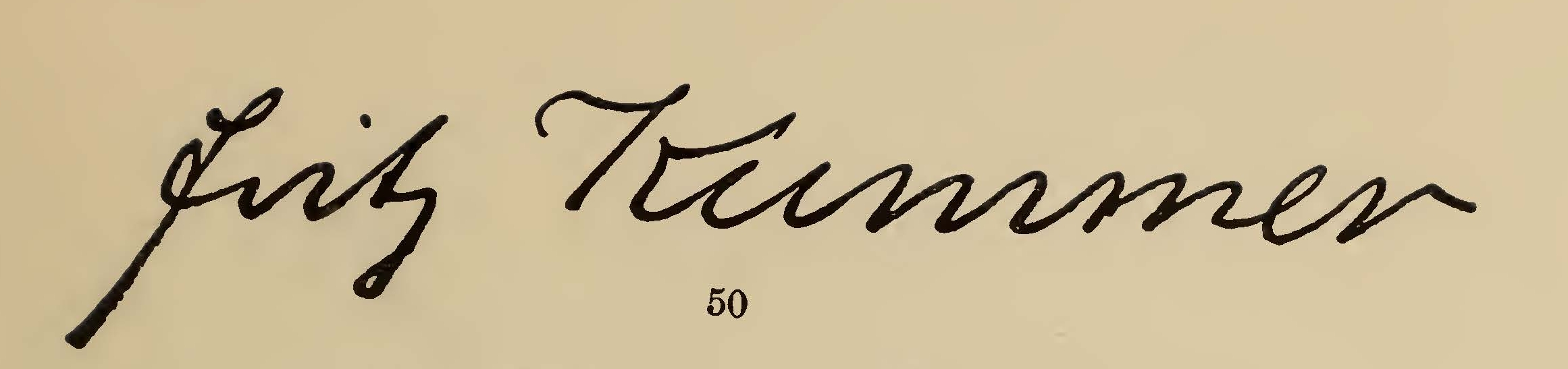 Faksimile der Unterschrift von Fritz Kummer. Fritz Kummer, ein deutscher Metallarbeiter, sozialdemokratischer Gewerkschafter und Reiseschriftsteller (»Eines Arbeiters Weltreise« v. 1913), Schriftleiter der »Metallarbeiter-Zeitung«, hat im Jahr 1920 einen Appell an Großbritannien unterzeichnet, der sich gegen einige Bestimmungen des Versailler Friedensvertrages richtete.